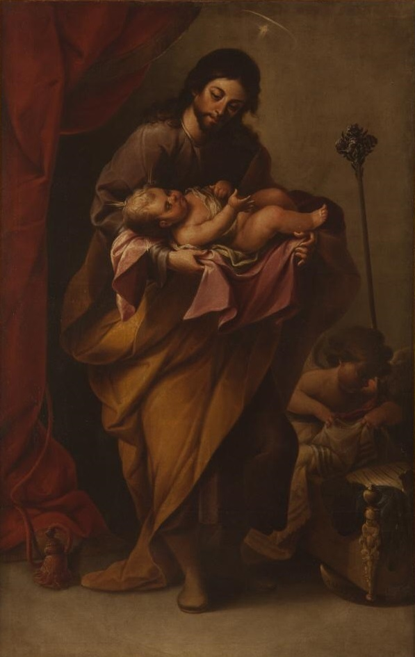 La obra representa a San José, el esposo de la Virgen María, llevando en brazos al Niño Jesús.